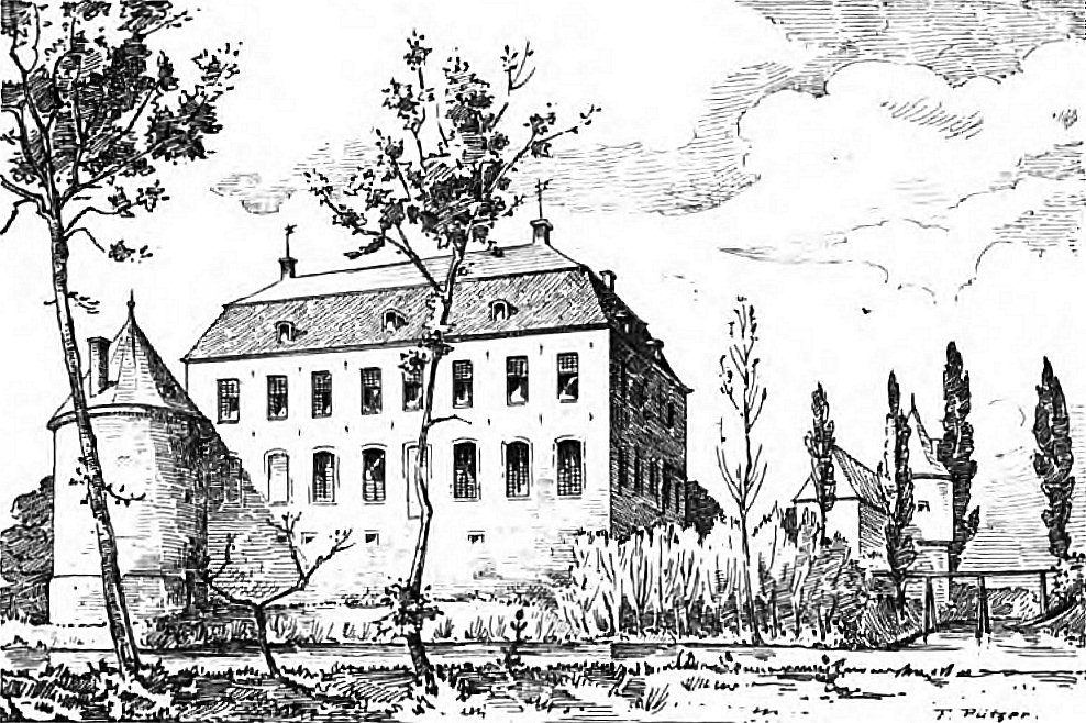 Stich des Herrenhauses von Schloss Hueth samt Archivturm in Rees-Bienen